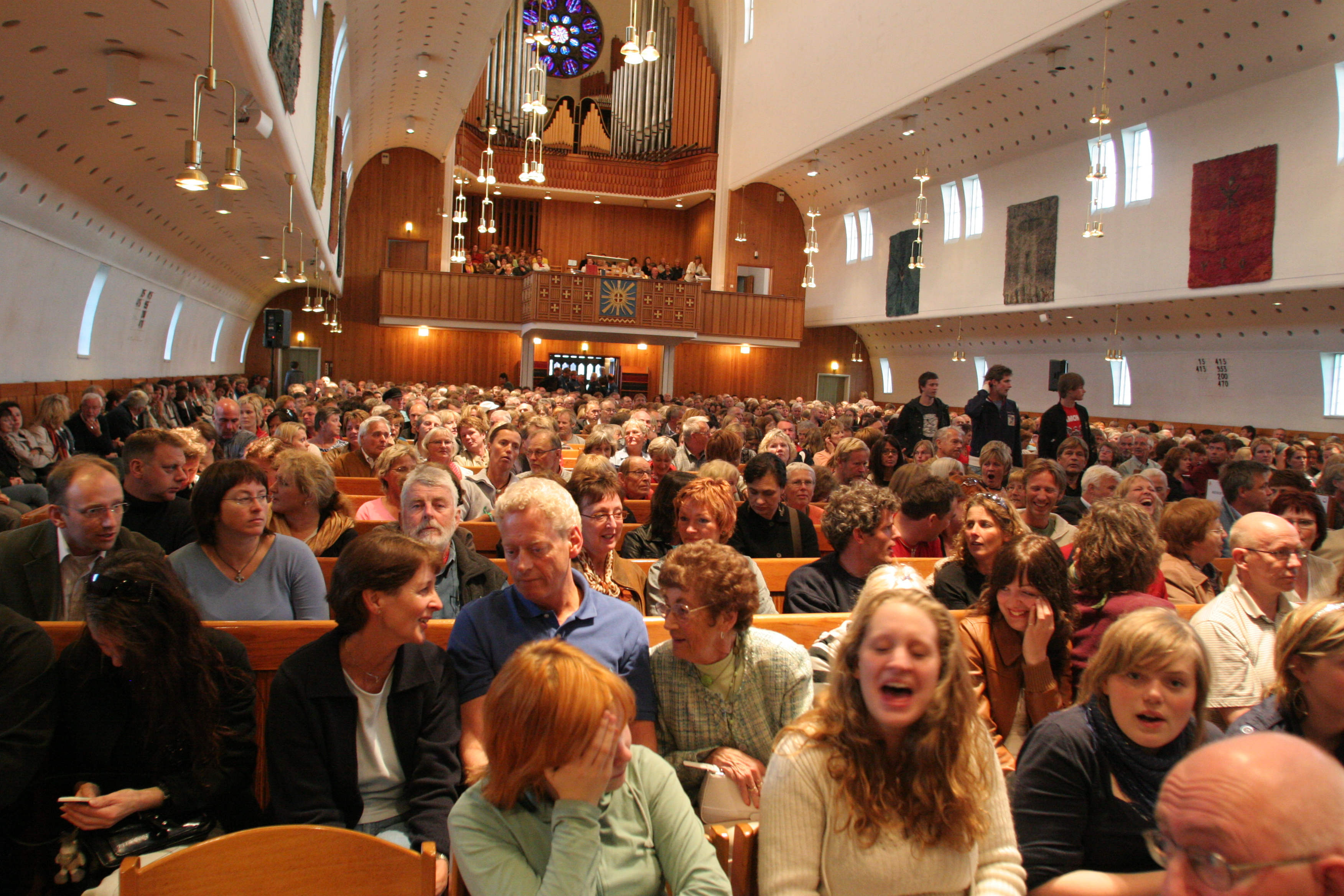 Bodø Domkirke under en konsert med Halvdan Sivertsen under forbundets Kystens landsstevne 2006 i Bodø